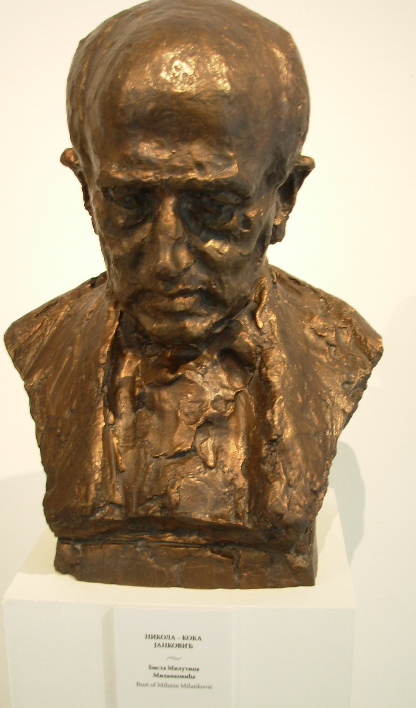 Bista Milutina Milankovića, izložba u Akademiji nauka, decembar 2011. Slikao Goldfinger